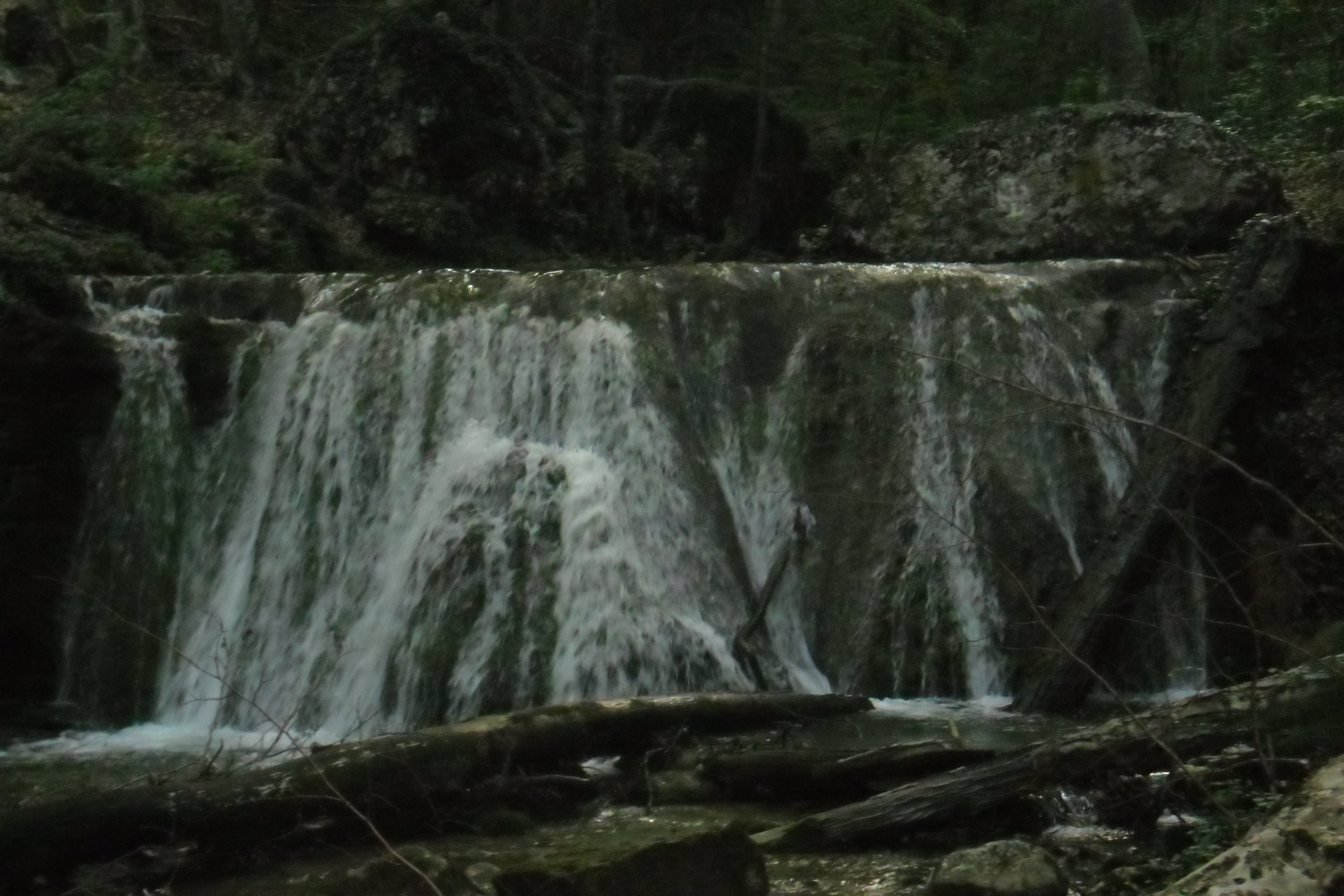 Фото